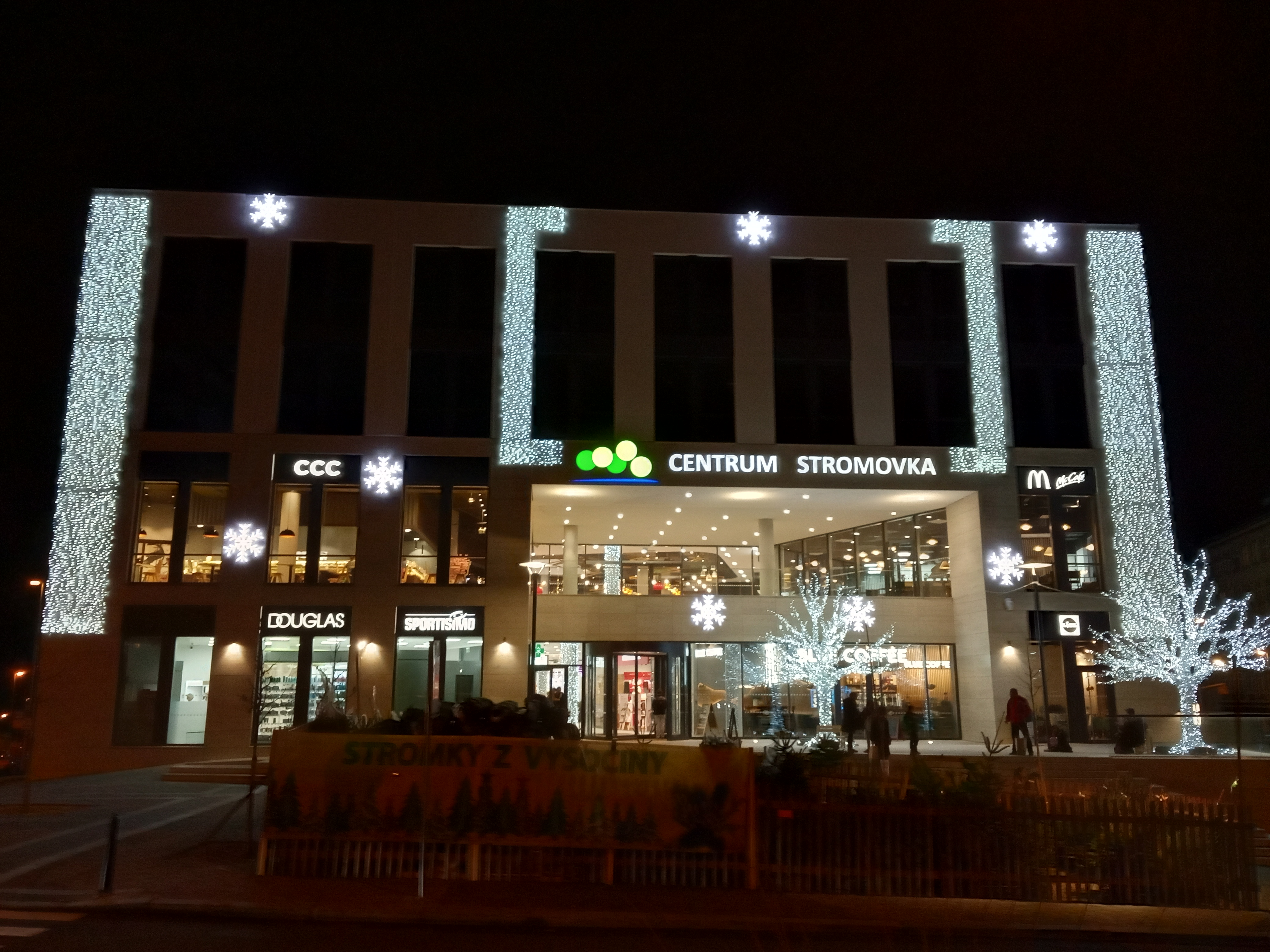 Praha - Holešovice, Centrum Stromovka